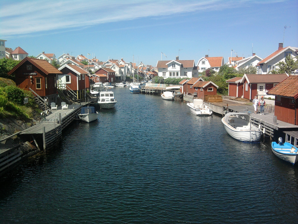 View from the Bridge in Grundsund (Sweden)